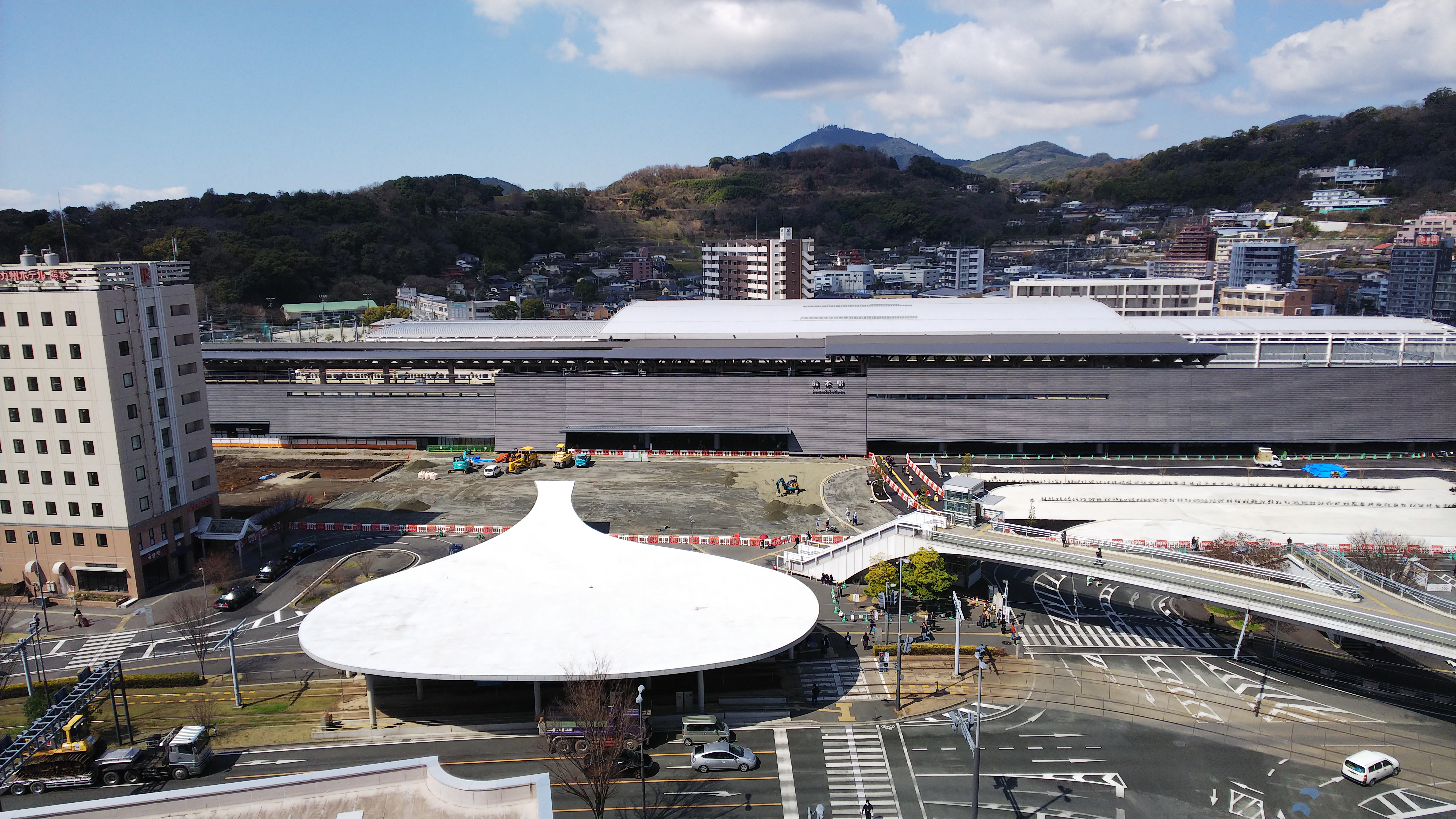 熊本駅全景(白川口)2019.03.11